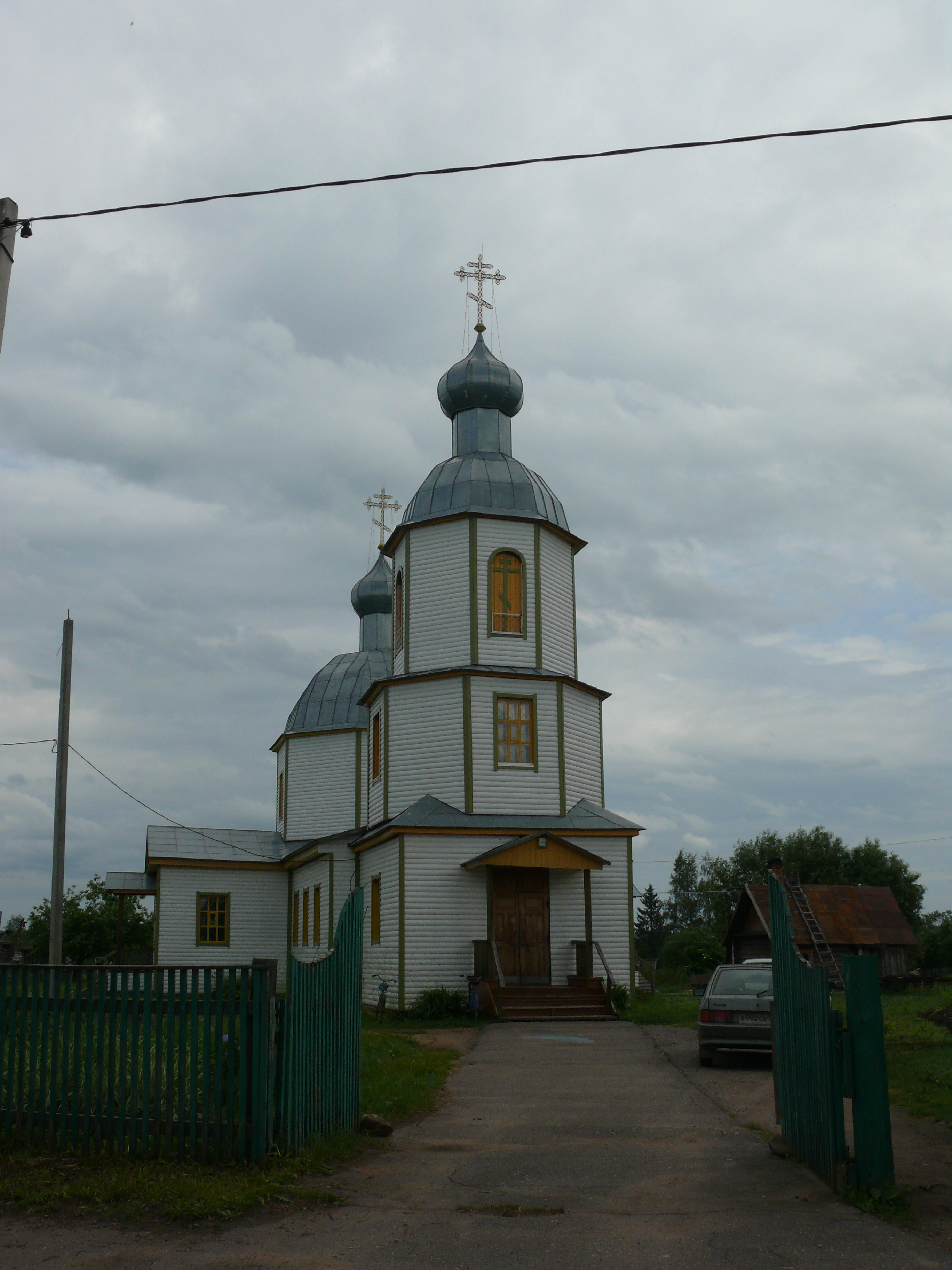 Поддорье, Новгородская область